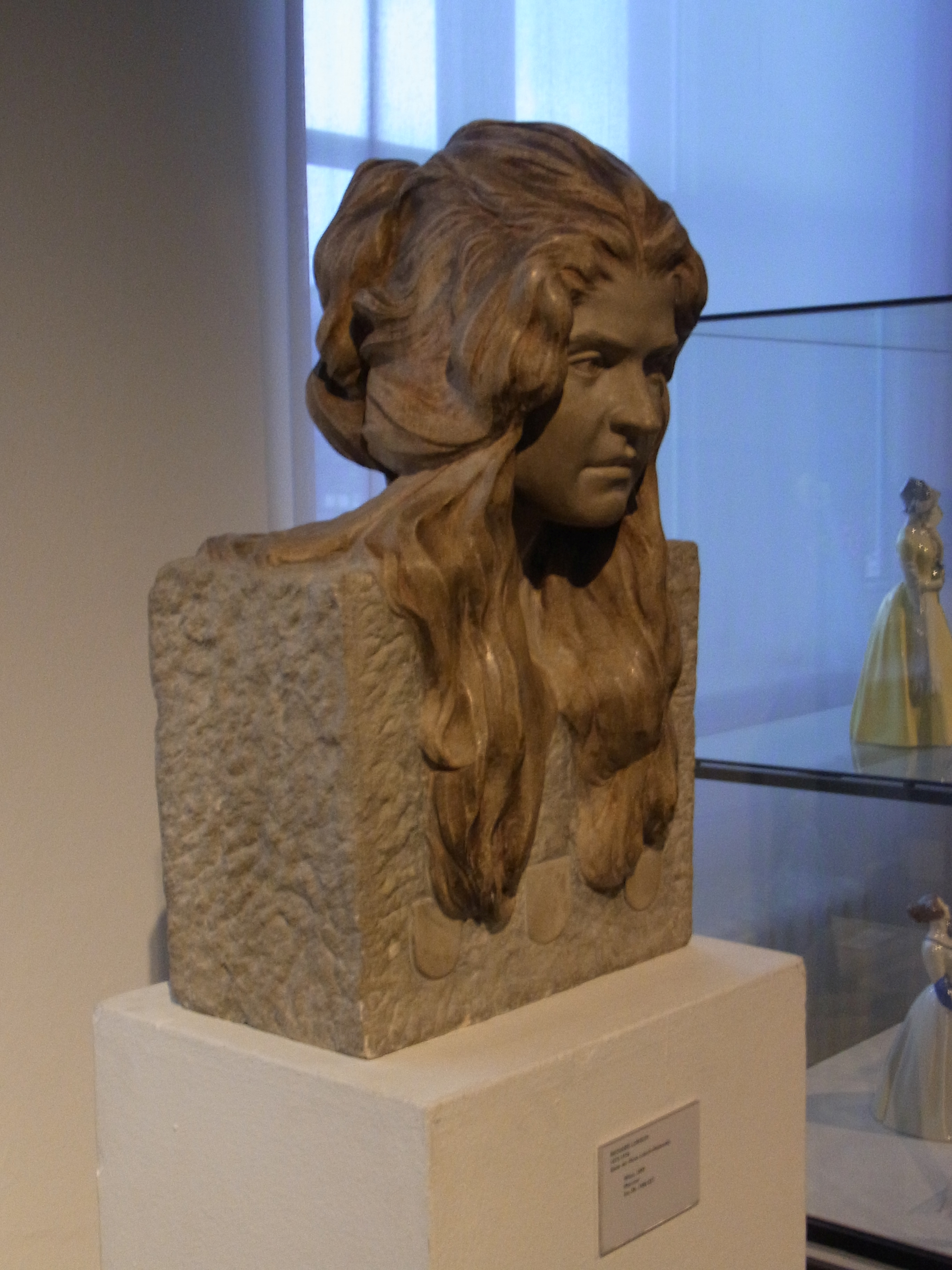 Marmorbüste von Elena Makowsky von Richard Luksch von 1899, d.h. im Jahr bevor sie heirateten. Geschenk des Sohnes Peter Luksch an das Museum für Kunst und Gewerbe Hamburg